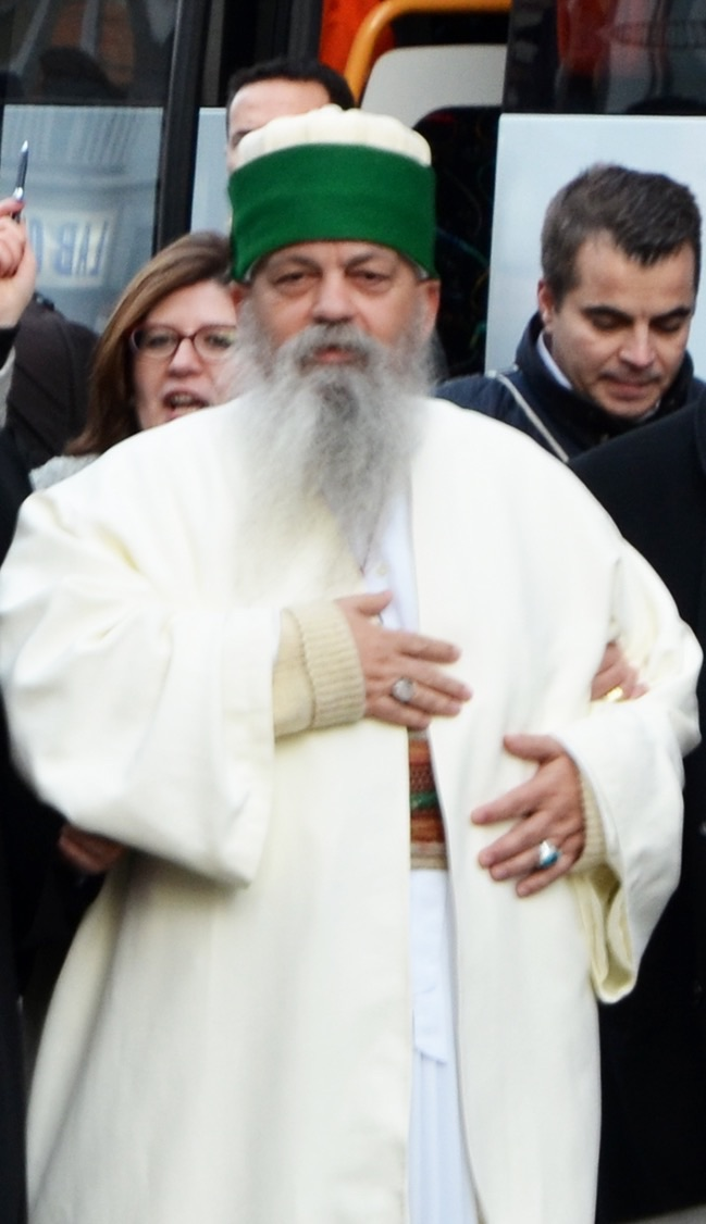 Manifestation en hommage aux morts des attentats de janvier 2015 à Paris - 11 janvier 2015